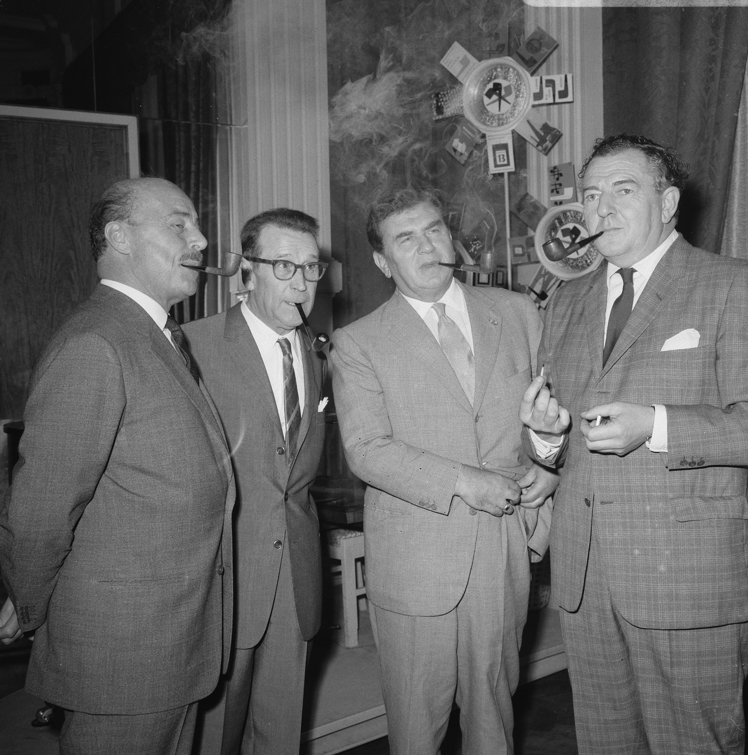 Collectie / Archief : Fotocollectie Anefo Reportage / Serie : Bezoek van de auteur Georges Simenon aan Amsterdam Beschrijving : Samen met de acteur JanTeulings en zijn Britse collega Rupert Davies en de Italiaanse Gino Cervi, bij het beeldje van Magrait in het Amstelhotel Datum : 2 september 1966 Locatie : Amsterdam, Noord-Holland Trefwoorden : acteurs, groepsportretten, schrijvers Persoonsnaam : Cervi, Gino, Davies, Rupert, Magrait, Simenon, Georges, Teulings, Jan Fotograaf : Evers, Joost / Anefo Auteursrechthebbende : Nationaal Archief Materiaalsoort : Negatief (zwart/wit) Nummer archiefinventaris : bekijk toegang 2.24.01.03 Bestanddeelnummer : 919-5220